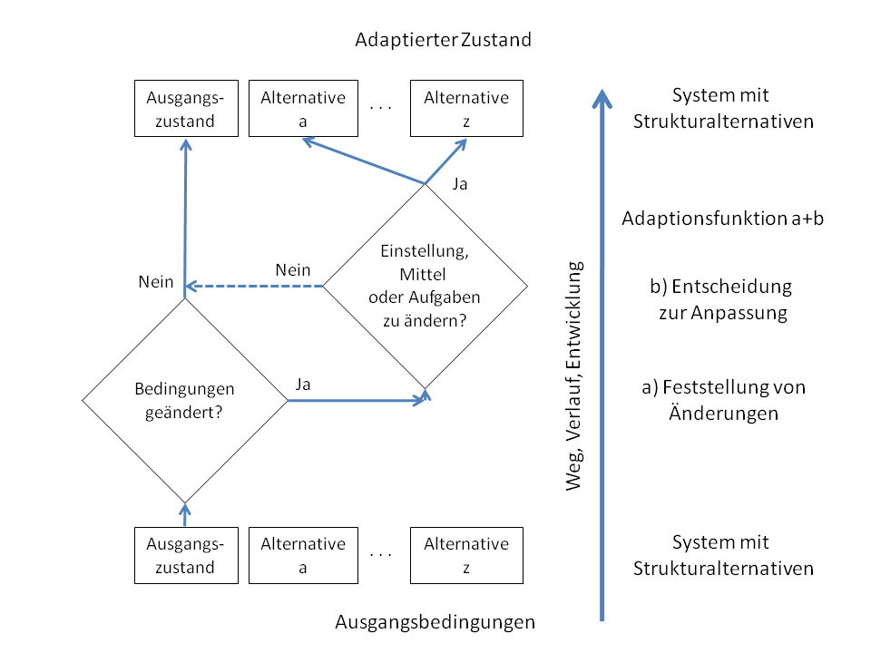 Veränderung eines Systems bei sich ändernden Bedingungen (gestrichelt: nur in Ausnahmefällen).